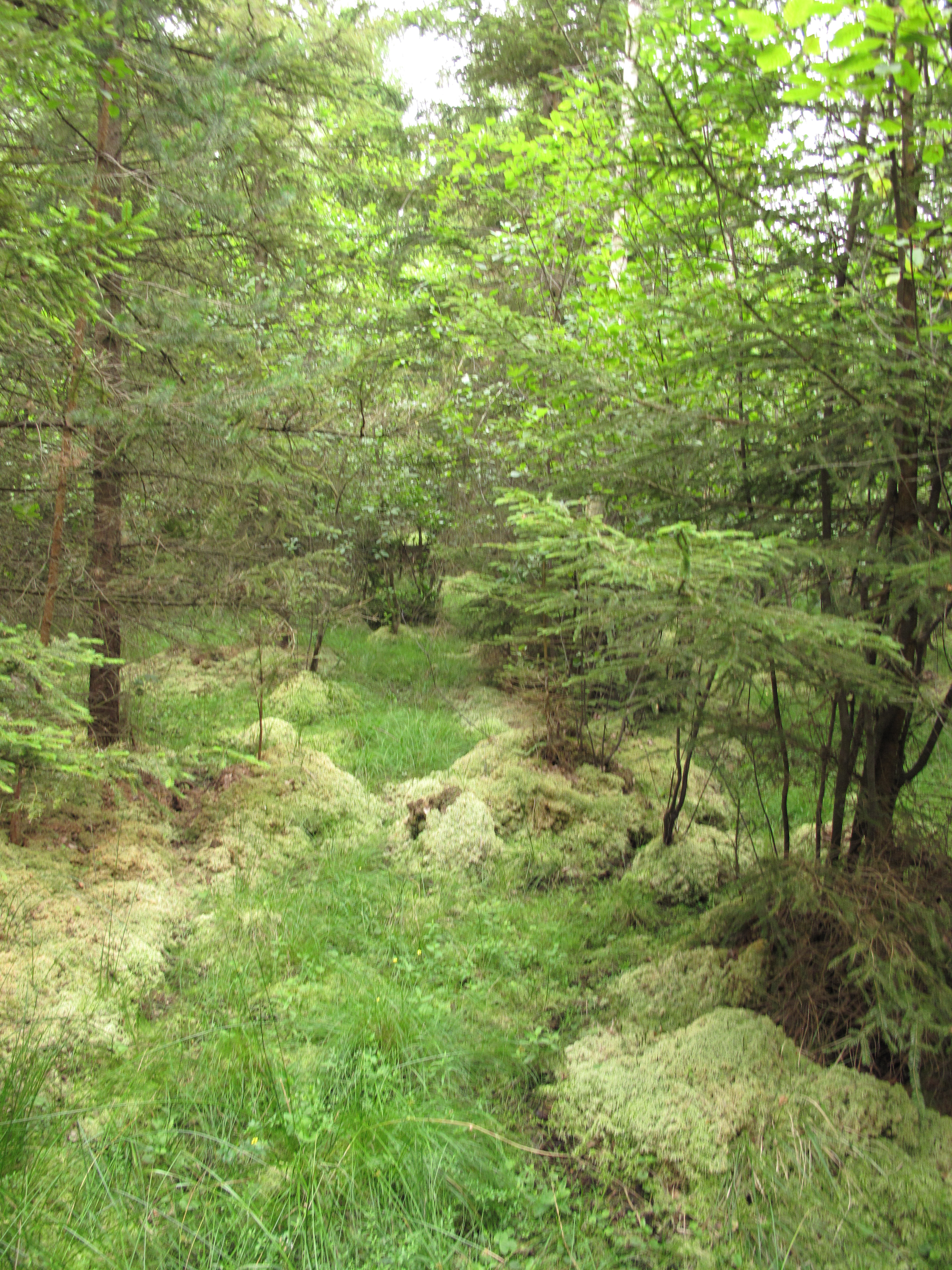 Přírodní rezervace Hůrky. Okres Plzeň-sever, Česká republika.